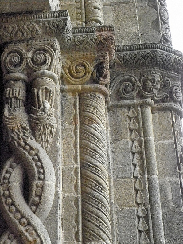 Église Saint-Gervais et Saint-Protais du Montet (03). Façade occidentale. Détail.